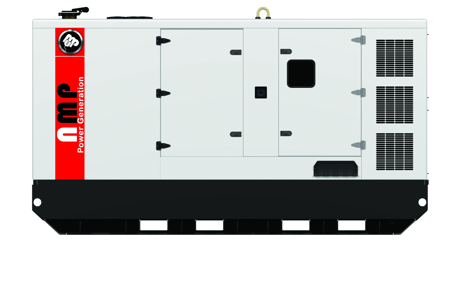 دیزل ژنراتور با کانوپی صداگیر(Canopy)